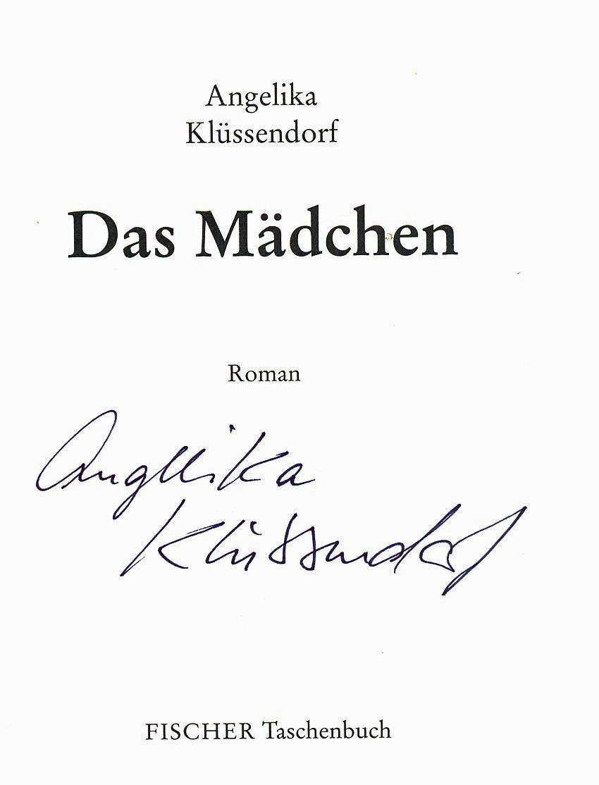 Autograph von Angelika Klüssendorf, 2013 in Ffm-Bergen-Enkheim